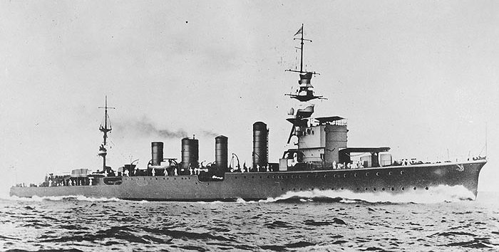 Leichter Kreuzer Jintsu